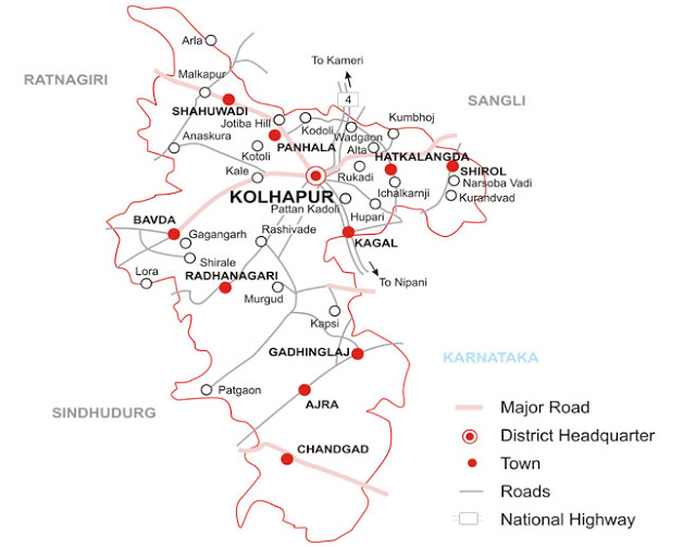 काेल्हापूर